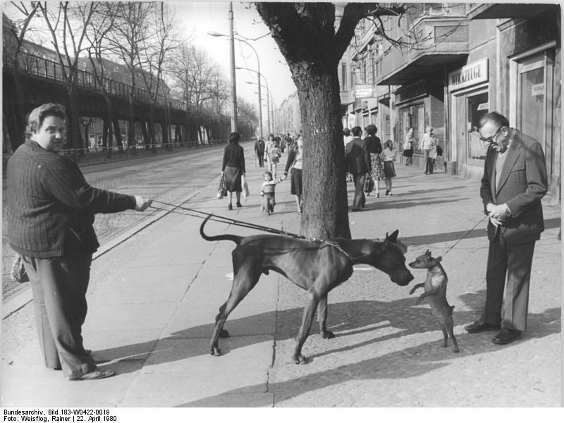 Berlin, Straßenszene, Passanten mit Hund ADN-ZB Weisfolg-22.4.1980 Berlin: Kuriose Hundebegegnung